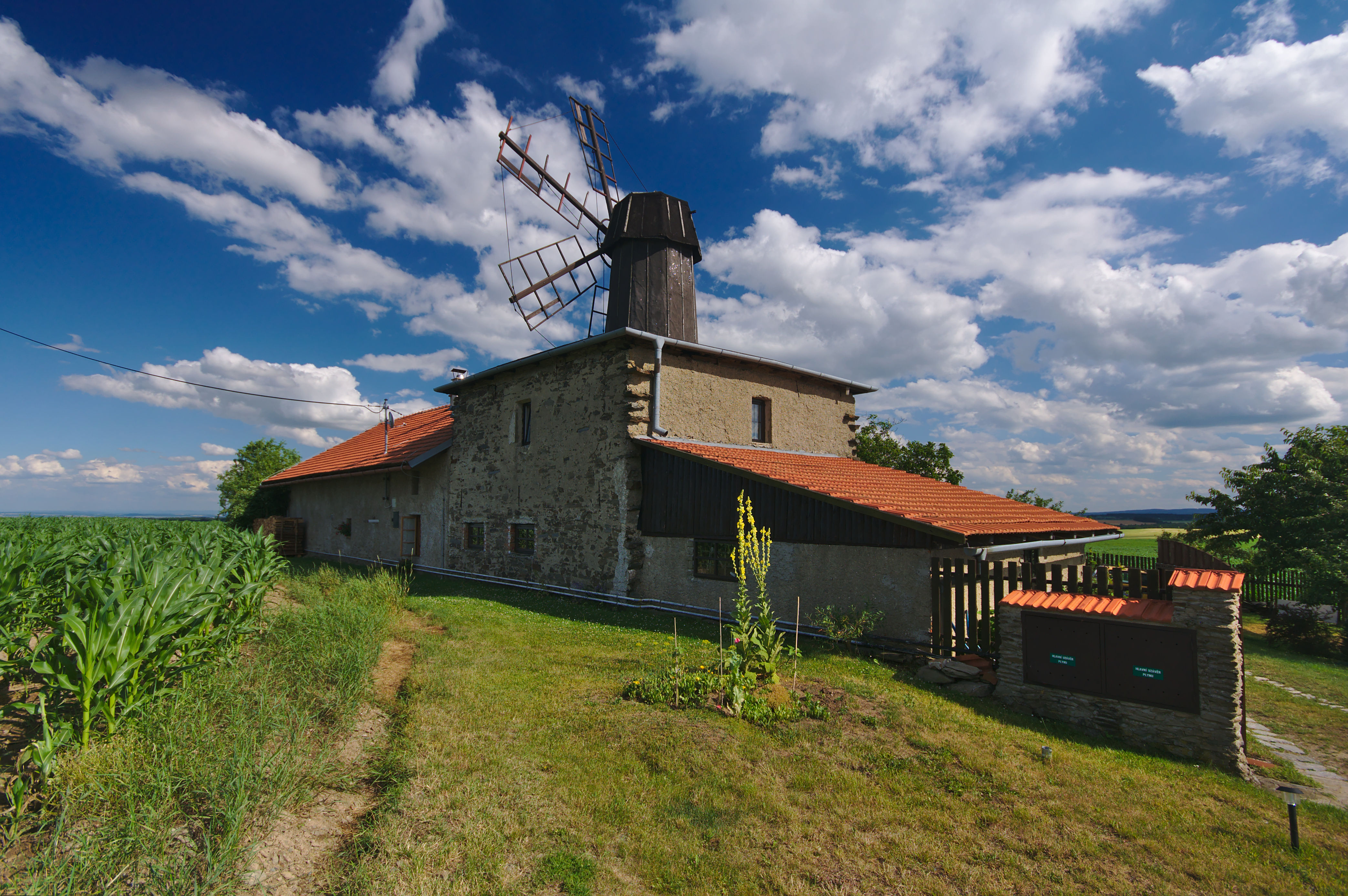 Větrný mlýn, Hačky, okres Prostějov